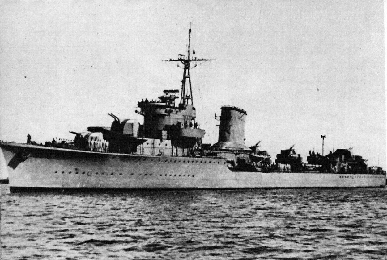 Niszczyciel ORP "Błyskawica" po powrocie do kraju w 1947 roku